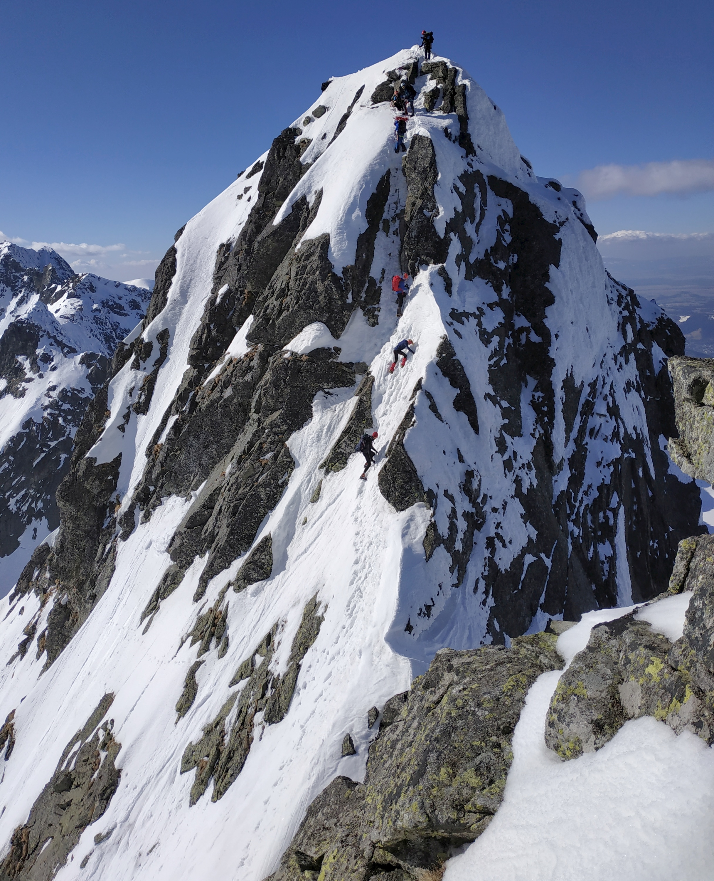 Kozie Czuby w Tatrach